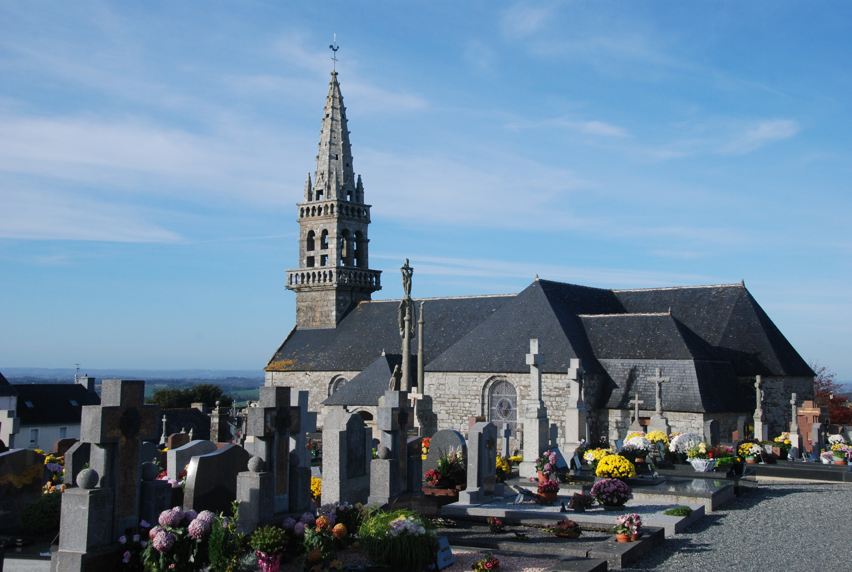 Cimetière et église de Motreff